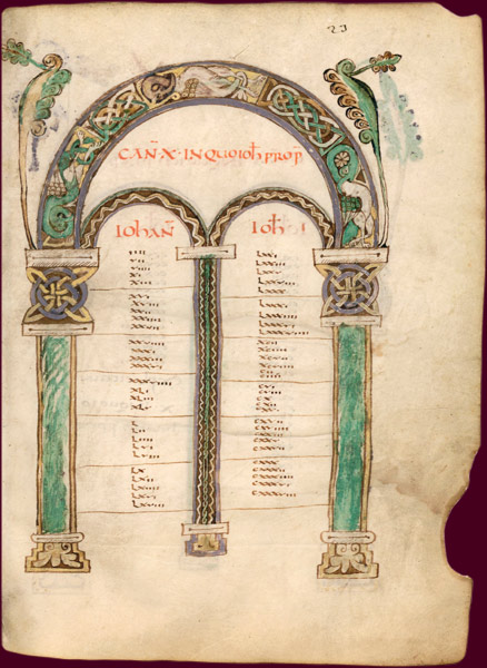 Таблицы канонов евангелия из Бамберга (Евангеля Алкуина), Турская школа, кон. VIII - нач. IXв.